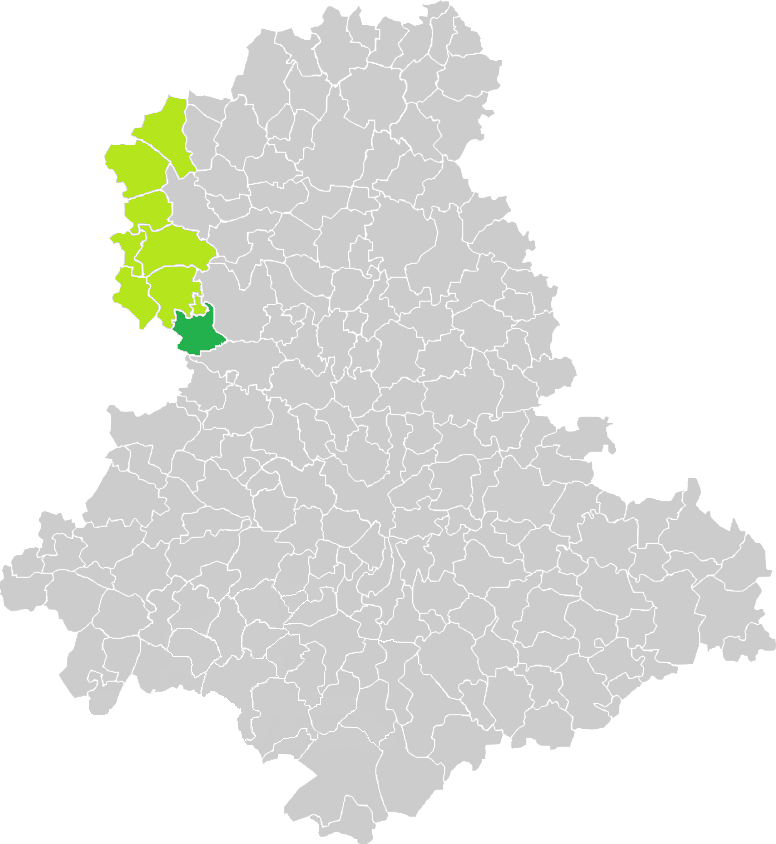 Carte de situation de la commune de Montrol-Sénard (en vert foncé) dans le votre Canton (en vert clair) sur une carte des communes de la Haute-Vienne